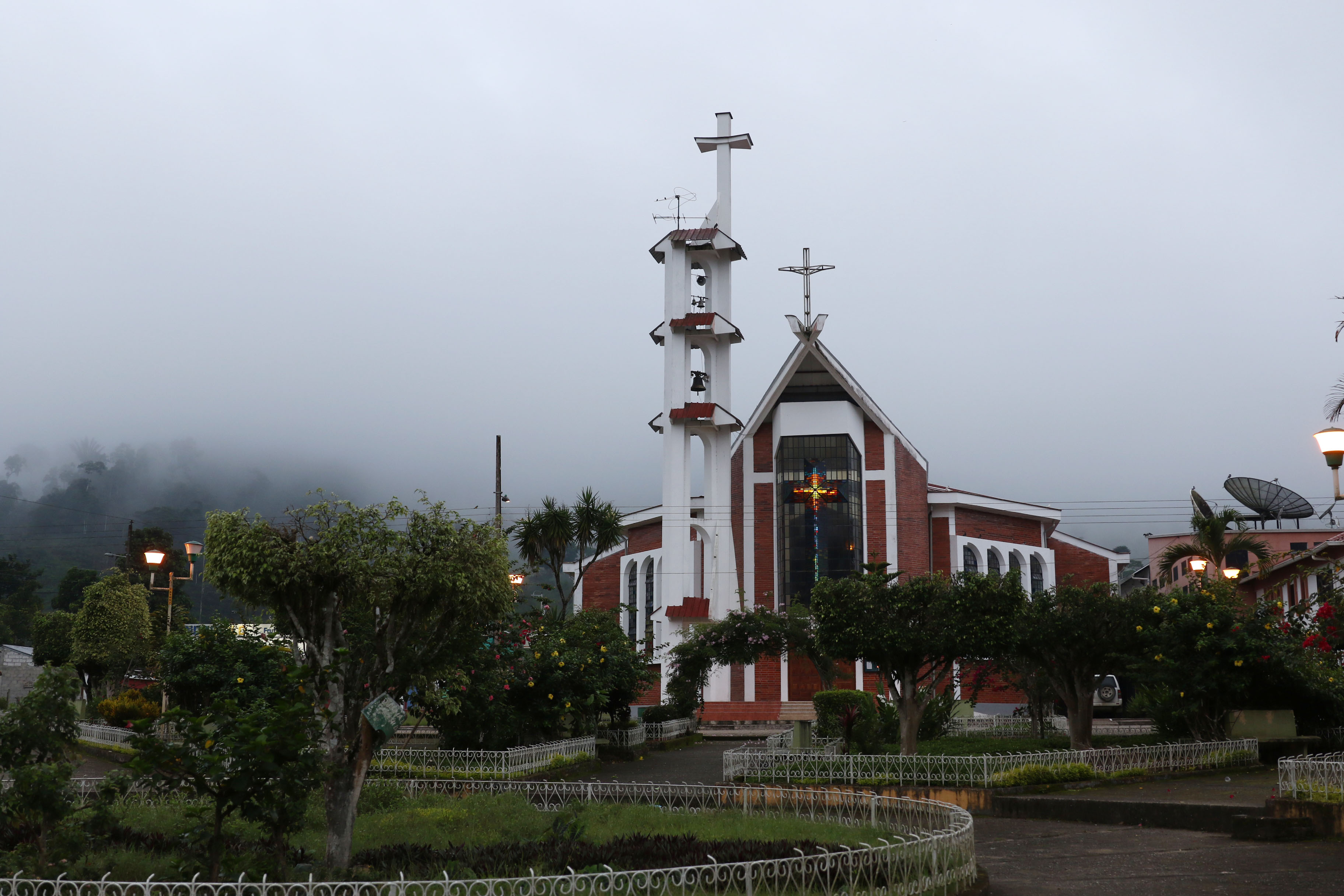 LOS ENCUENTROS 2 MAV